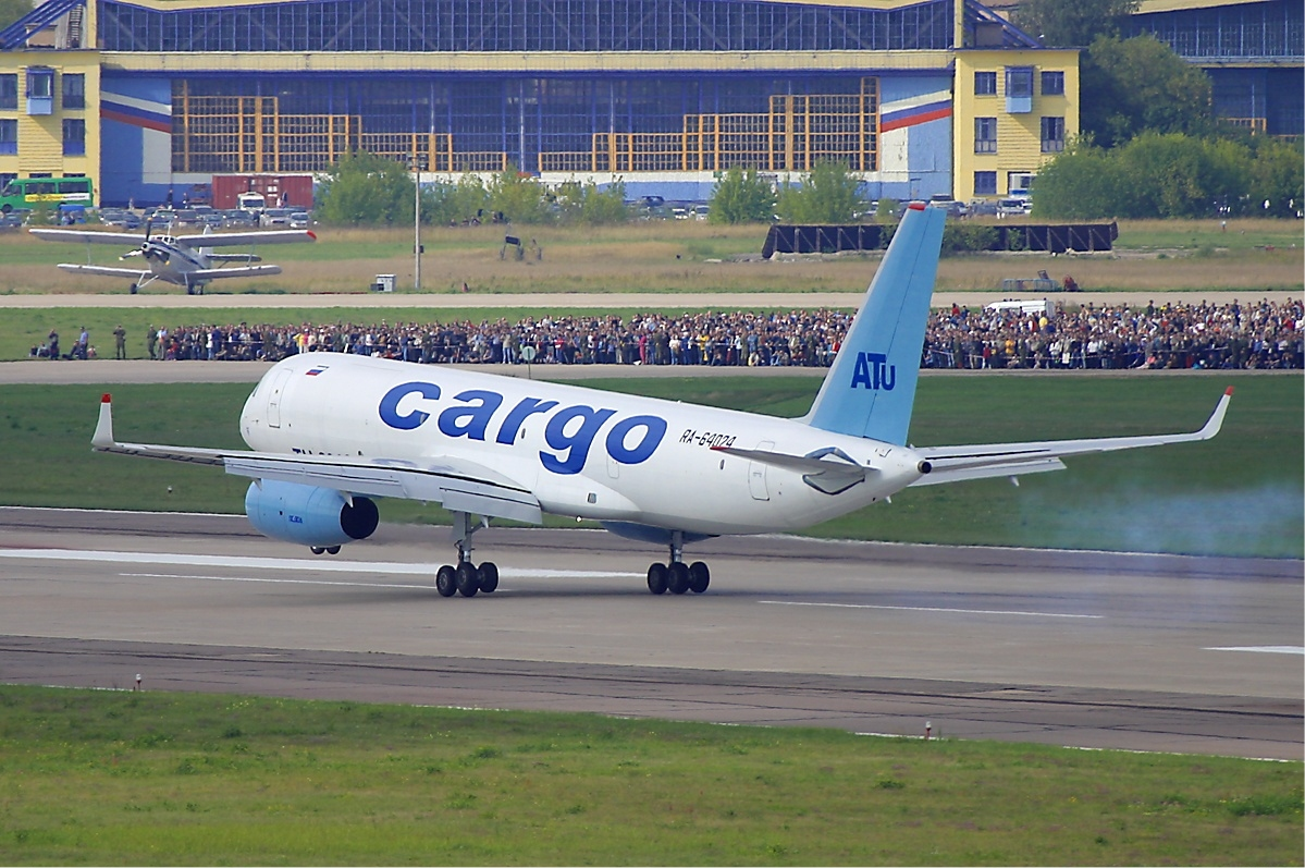 Aviastar-TU Tupolev Tu-204S